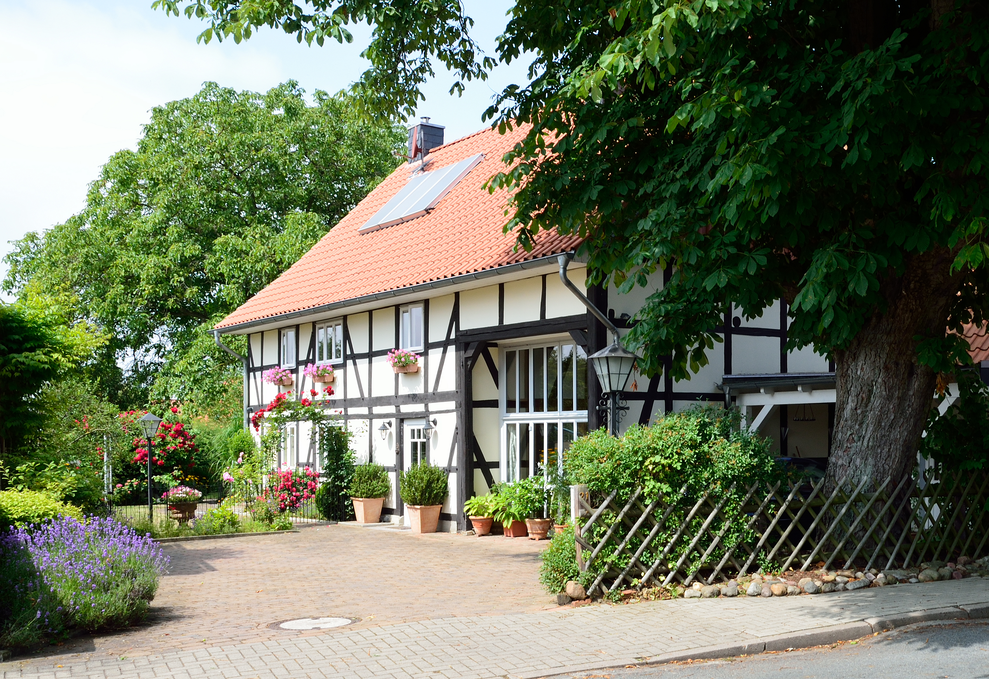 Fachwerkhaus in Sophiental (Wendeburg) am Spannweg